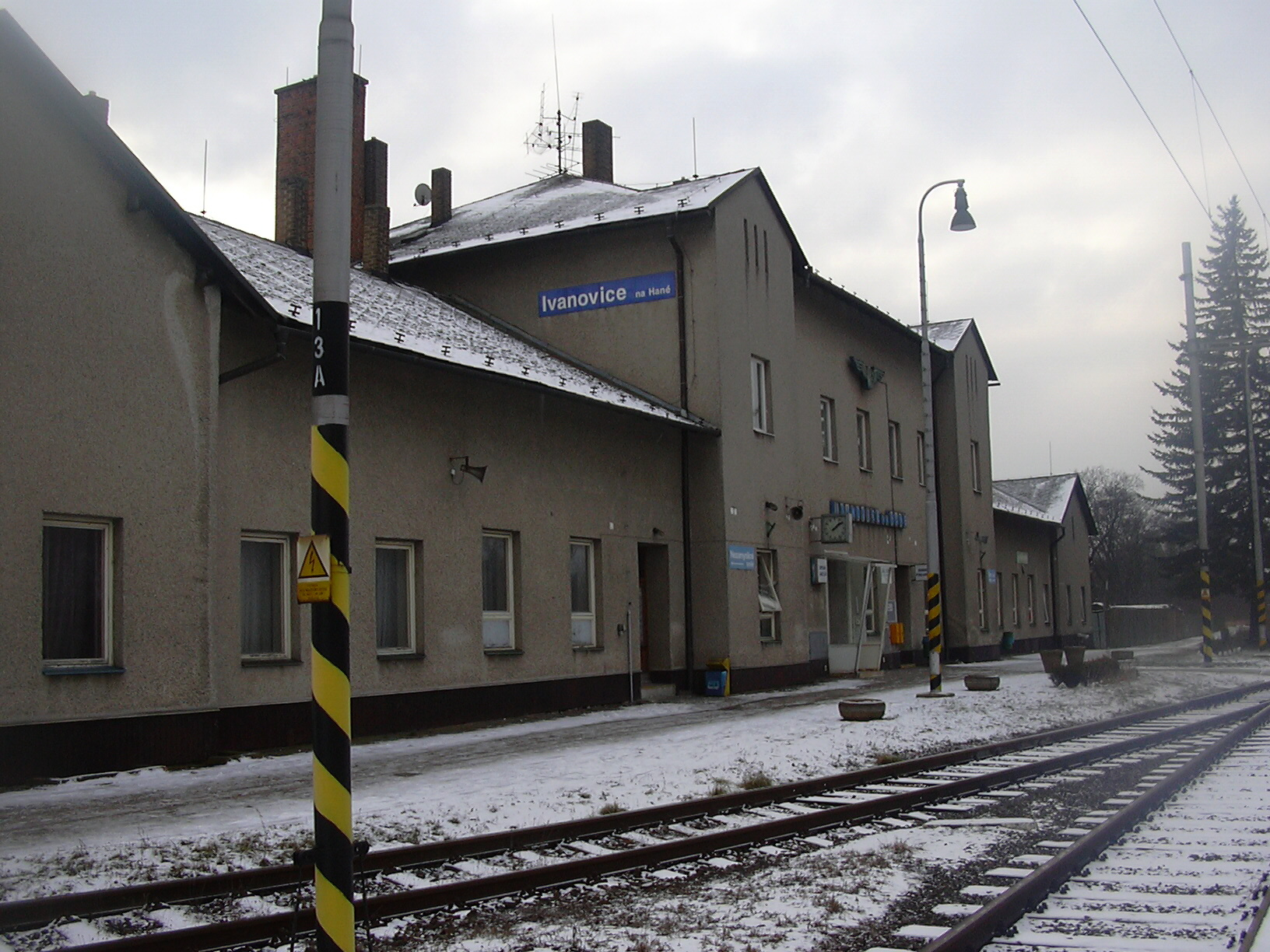 Vlakové nádraží Ivanovice na Hané (Ivanovice na Hané, Vyškov District, Czech Republic)